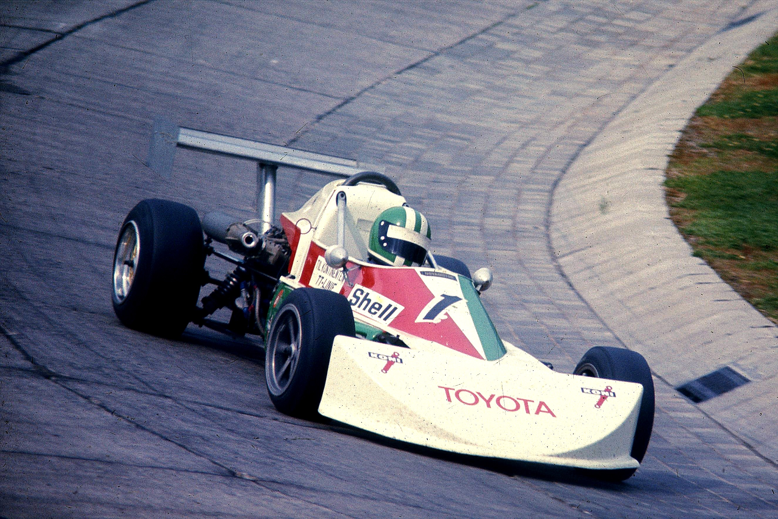 Rudolf Dötsch im KWS-March-Toyota (March 763) auf dem Nürburgring (Schwalbenschwanz bzw. Kleines Karussell). Rudolf Dötsch gewann das Rennen über 5 Runden (114,175 km in 40:32,6 Minuten); Wertungslauf für die ONS-Meisterschaft der Formel 3.